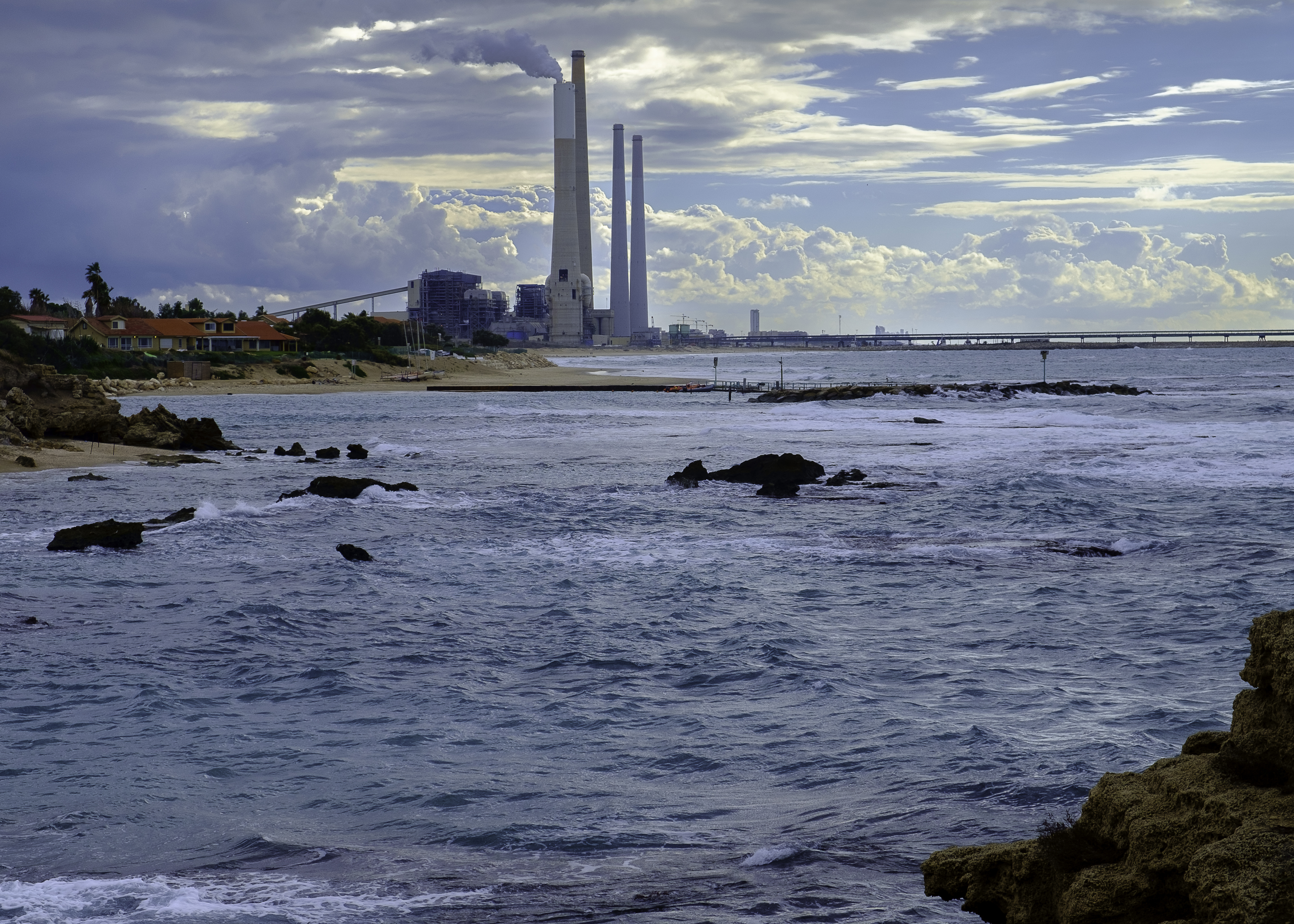 Torens van Orot Rabin vanaf Caesarea Maritima